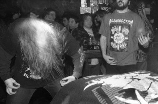 Heavy Metaller mit Bandshirt von Resurrection, 1994in der Diskothek Fantasy (1981-2001) in München-Neuaubing